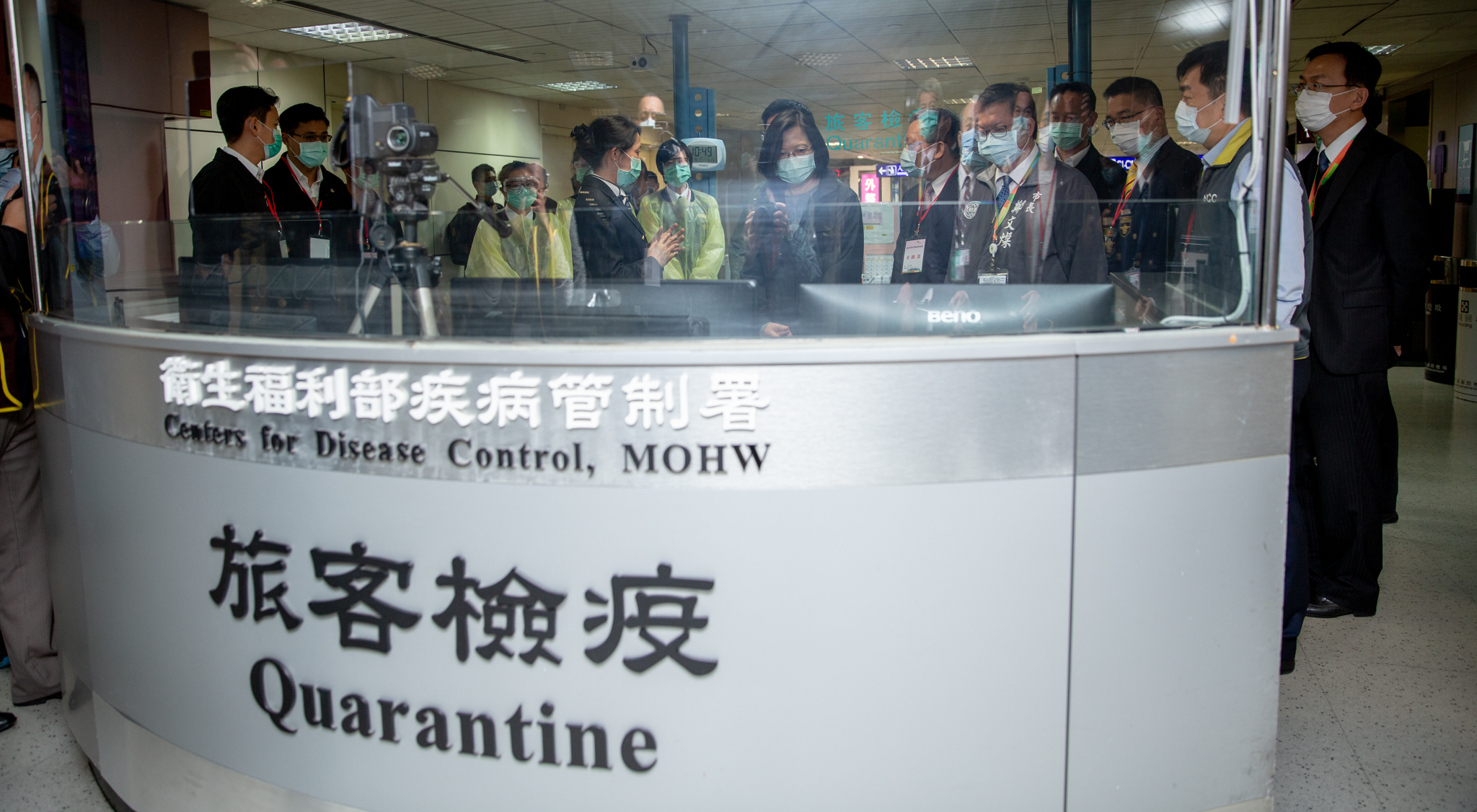 臺灣桃園國際機場，中華民國總統蔡英文、桃園市市長鄭文燦視察衛生福利部疾病管制署發燒篩檢站。